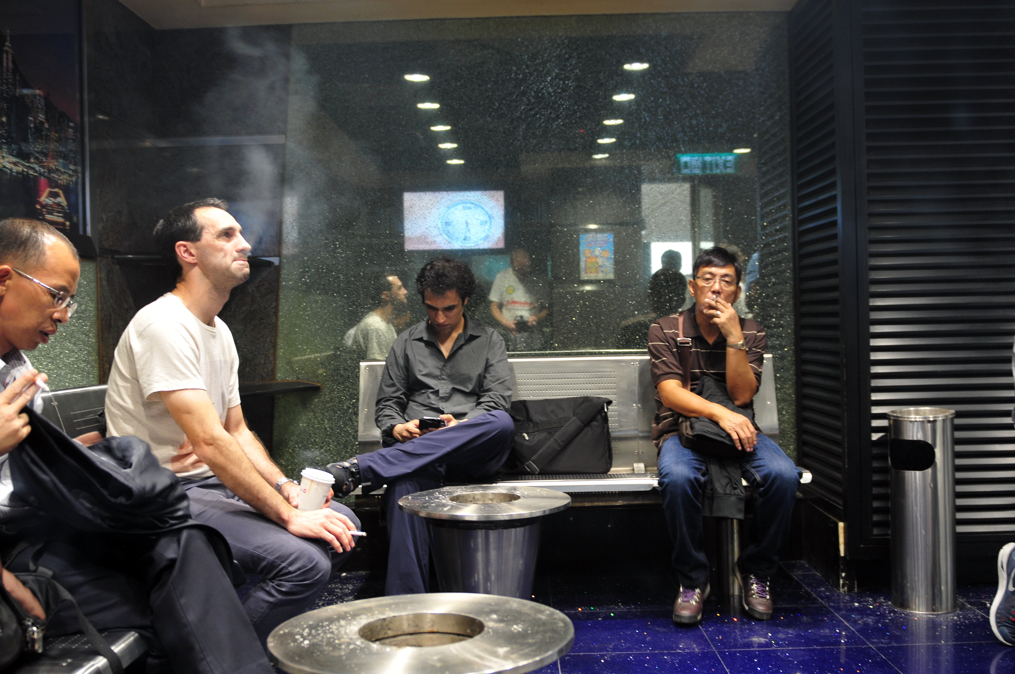 Wikimania 2013 Hongkong